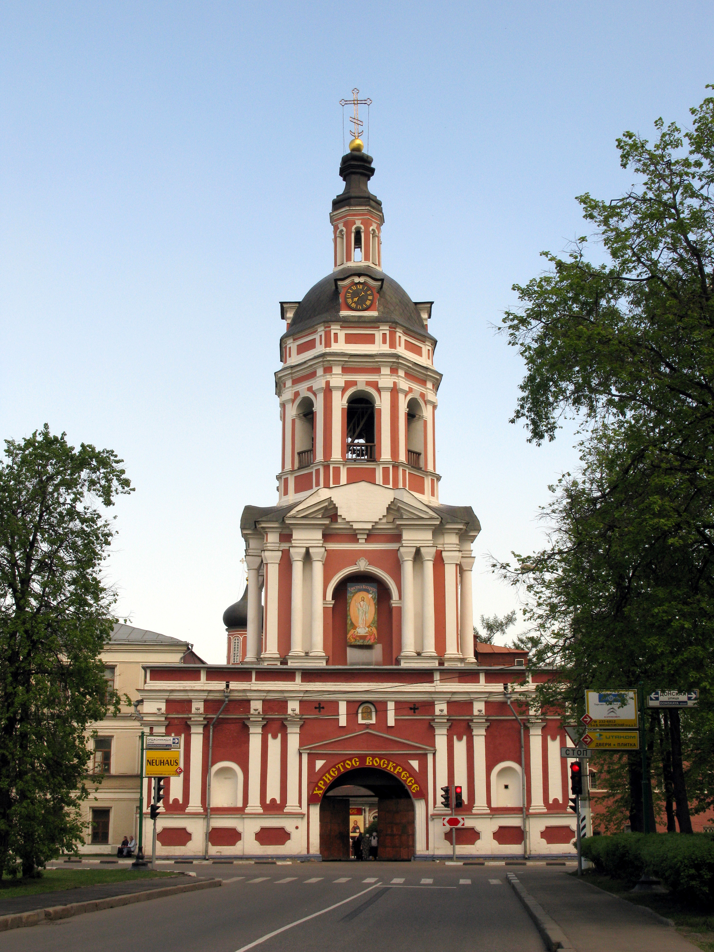 Храм Захарии и Елисаветы под колокольней Донского монастыря